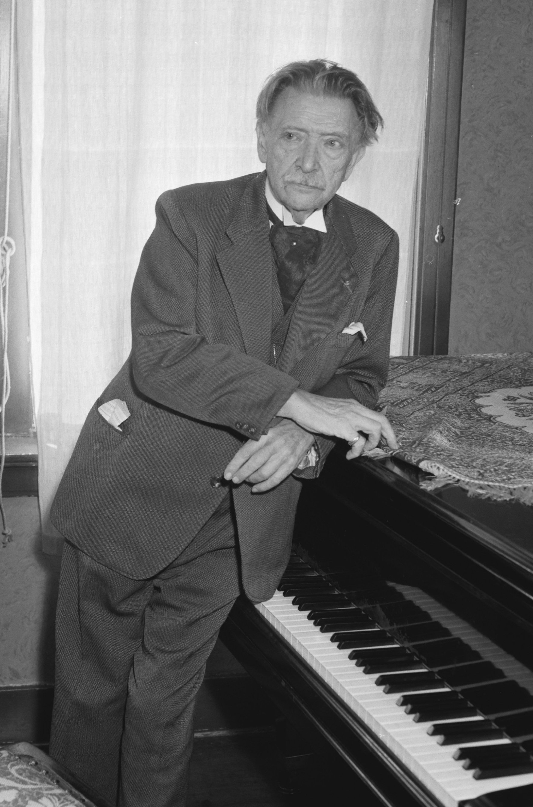 Collectie / Archief : Fotocollectie Anefo Reportage / Serie : [ onbekend ] Beschrijving : 26 december as hoopt Hubert Cuypers 85 jaar te worden Datum : 22 december 1958 Persoonsnaam : Cuypers, Hub., Cuypers, Hubert Fotograaf : Rossem, Wim van / Anefo Auteursrechthebbende : Nationaal Archief Materiaalsoort : Negatief (zwart/wit) Nummer archiefinventaris : bekijk toegang 2.24.01.04 Bestanddeelnummer : 910-0512